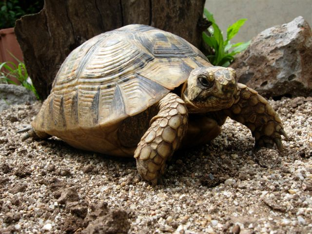 Testudo graeca nabeulensis varietà 'Sarda', Sardegna, Italia